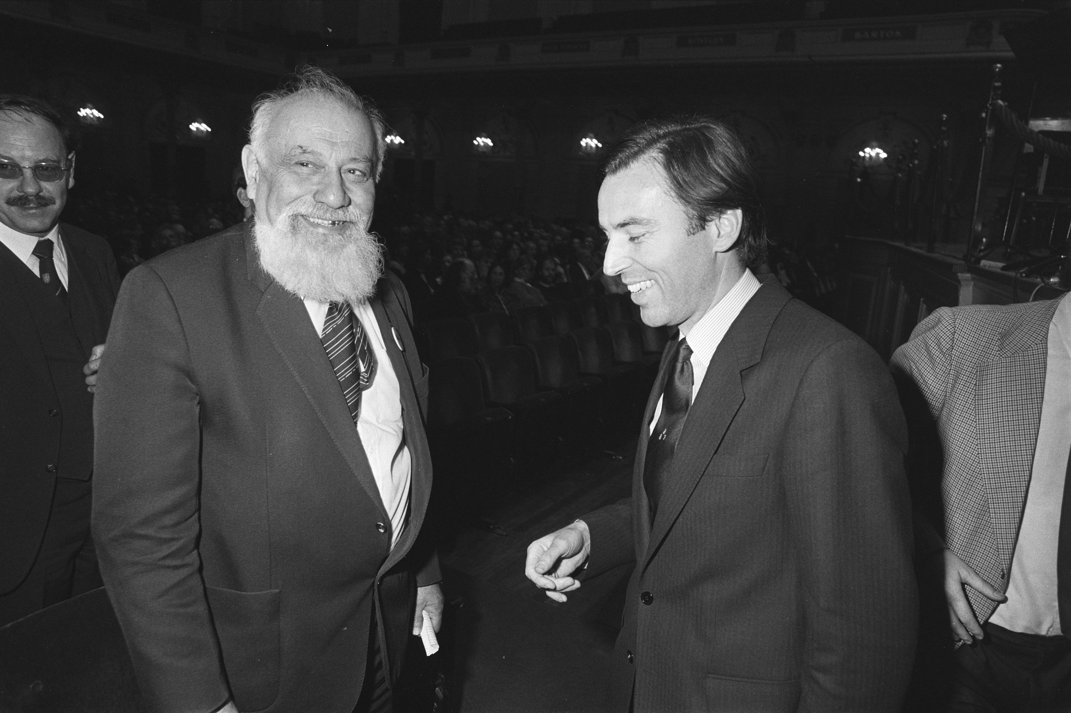 Collectie / Archief : Fotocollectie Anefo Reportage / Serie : [ onbekend ] Beschrijving : Benefietconcert voor Russische dissident Sacharov in Concertgebouw Amsterdam; minister Brinkman en Kopelev Datum : 24 mei 1984 Locatie : Amsterdam, Noord-Holland Trefwoorden : CONCERTGEBOUWEN, politici Persoonsnaam : Brinkman, Elco Fotograaf : Antonisse, Marcel / Anefo Auteursrechthebbende : Nationaal Archief Materiaalsoort : Negatief (zwart/wit) Nummer archiefinventaris : bekijk toegang 2.24.01.05 Bestanddeelnummer : 932-9798